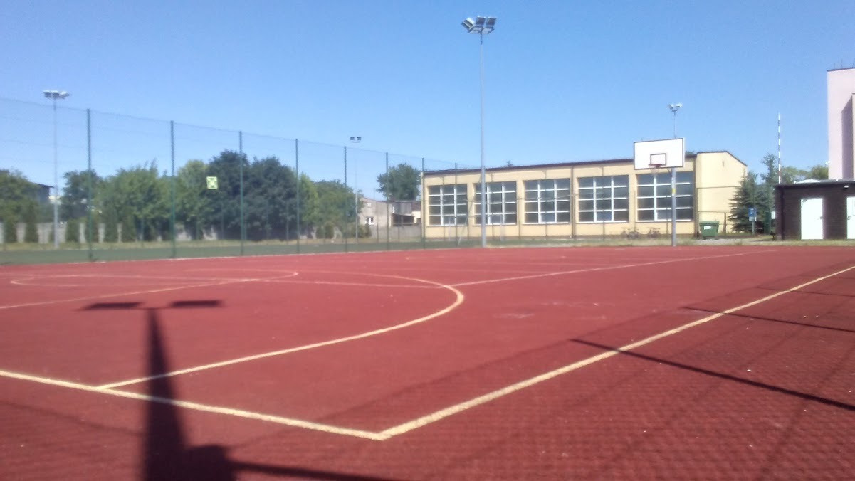 Boisko do gry w koszykówkę przy III Liceum Ogólnokształcącym im. im. płk. Stanisława Hojnowskiego w Tomaszowie Mazowieckim